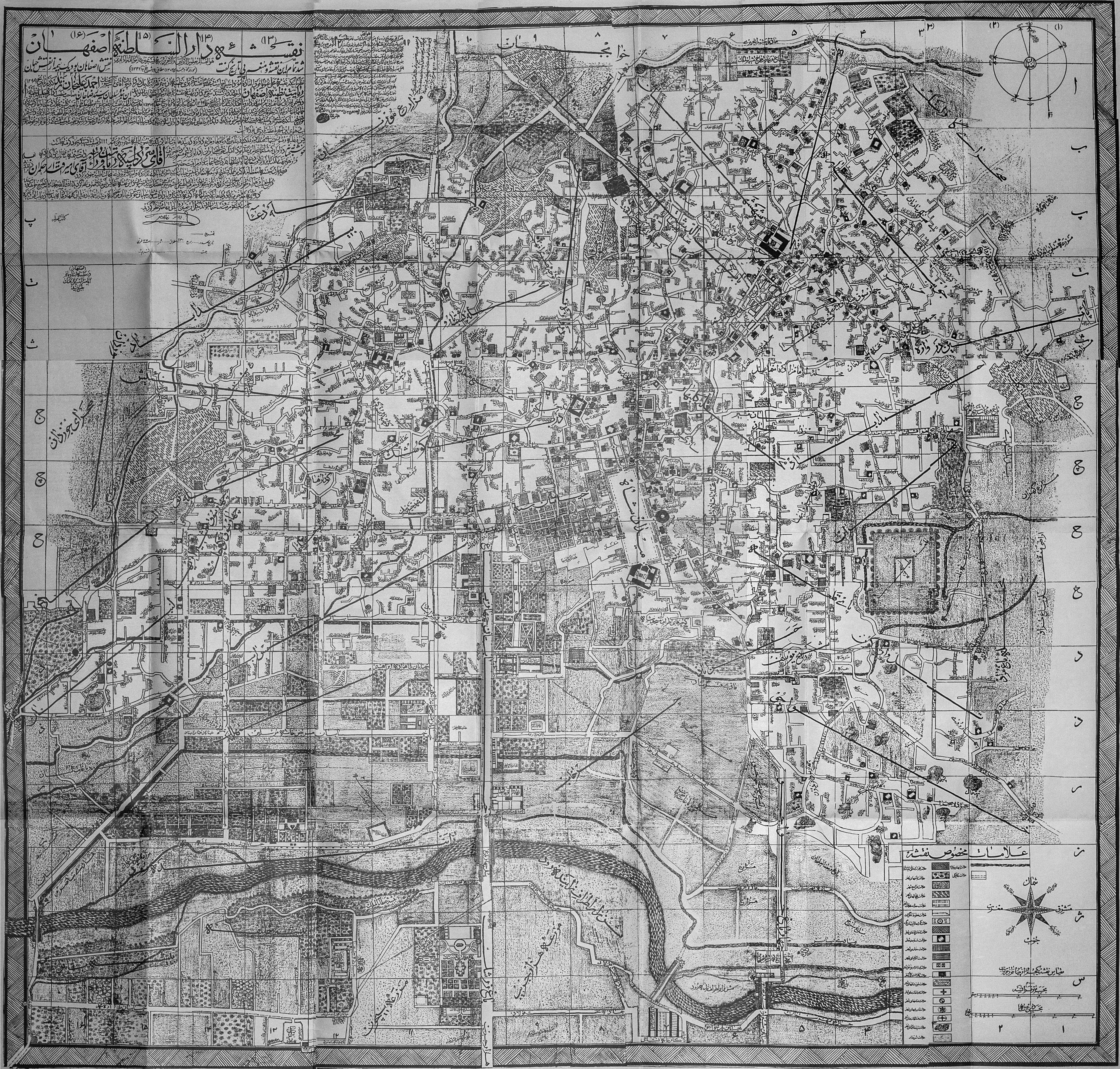 نقشه اصفهان تکمیل شده در 25 دی 1302